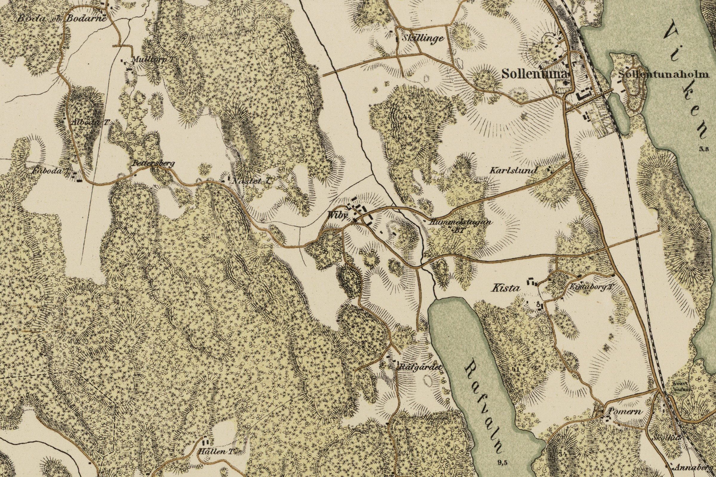 Del av karta över Stockholm och omgivning som visar Sollentuna och Viby gård med torpen Fäboda, Mulltorp, Alboda, Nästet och Kista